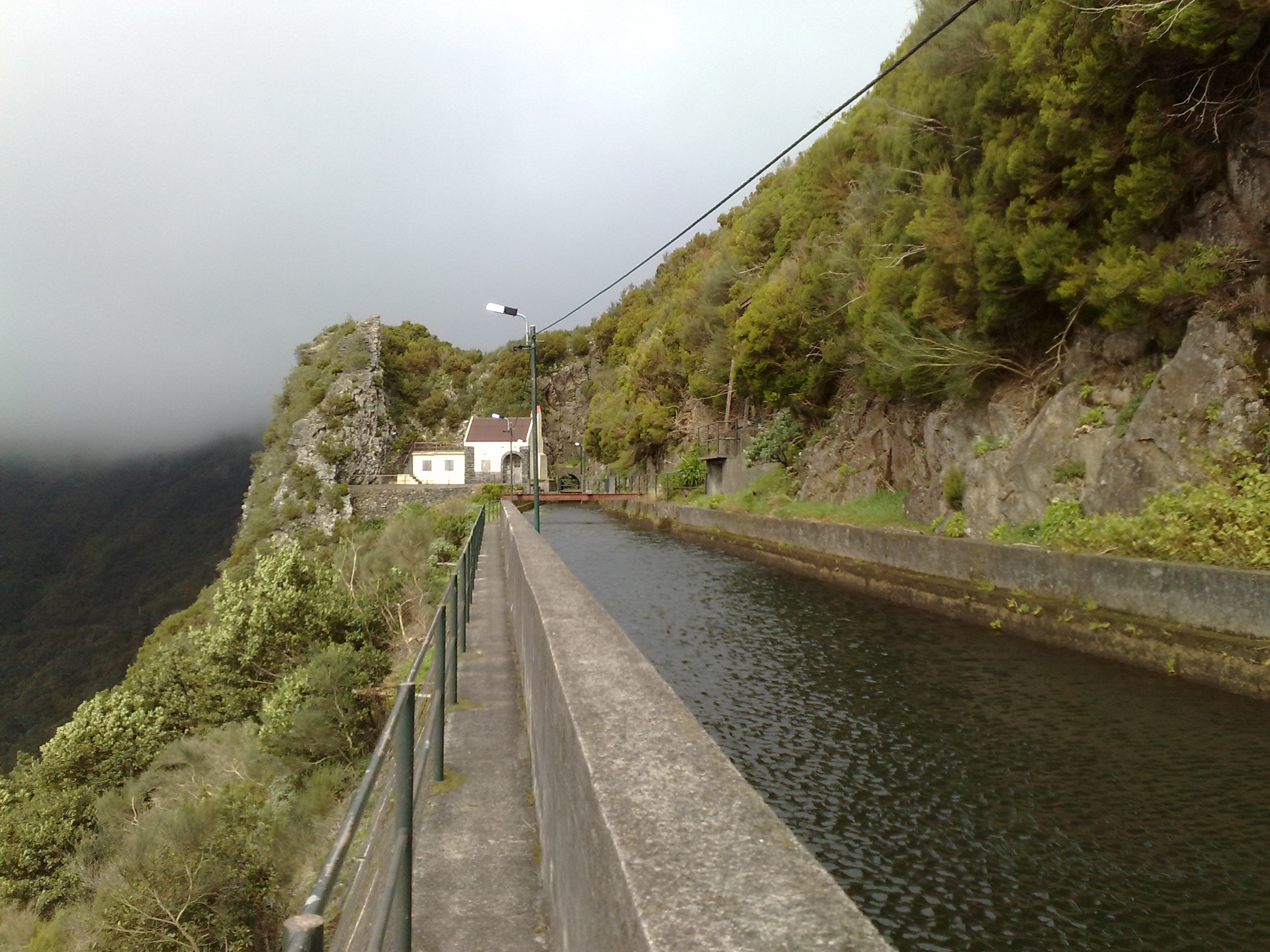 Speicherbecken am Ende der Levada oberhalb des Wasserkraftwerks bei Serra de Água